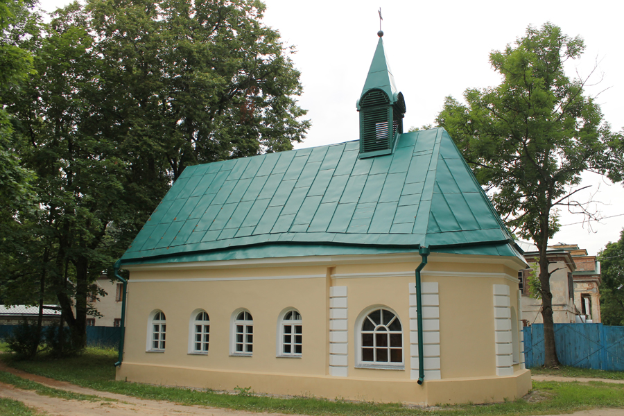 Капліца Святой Марыі. Залессе